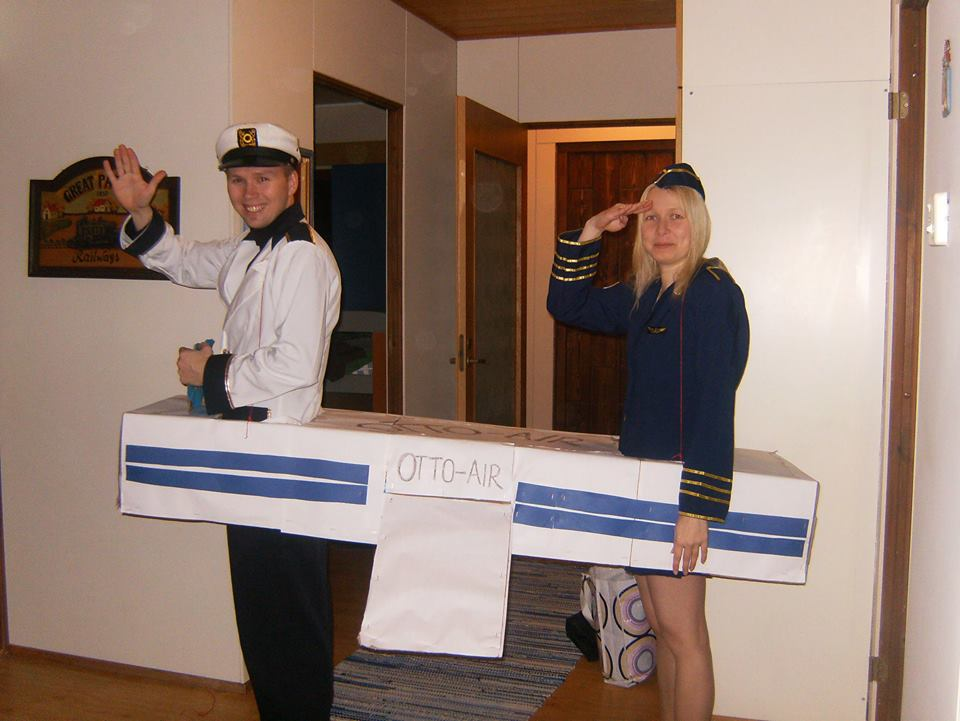 Kuva naamiaisista. Lentokapteeni.